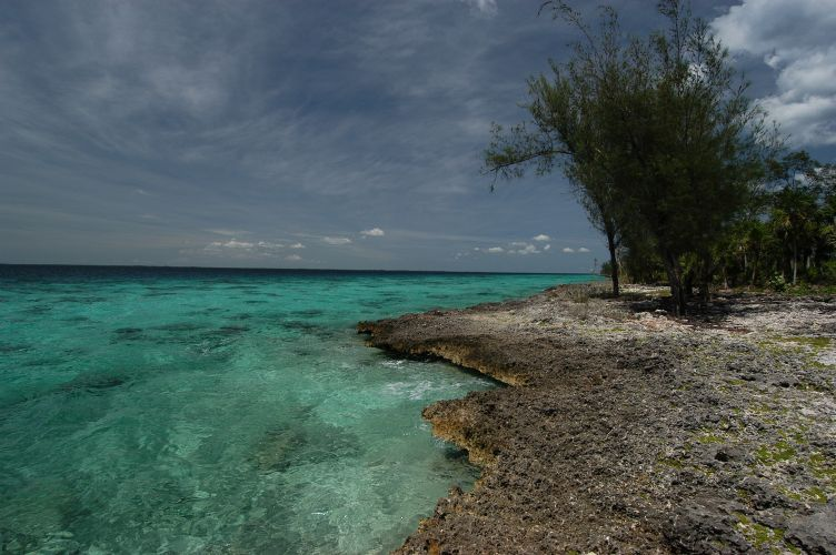 Bargebaai fan Cueva de los Peces ôf.